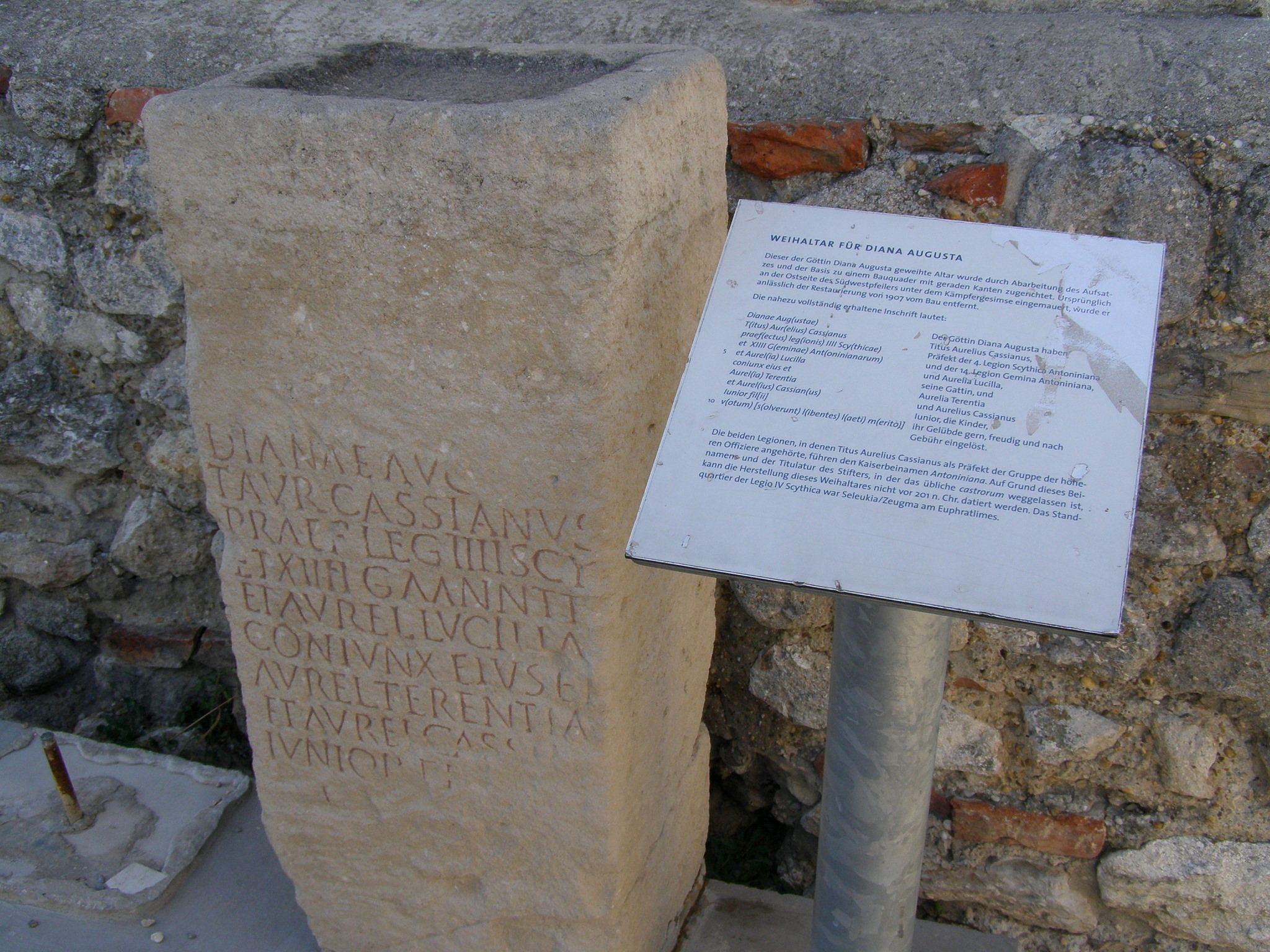 Reproducción de una inscripción votiva romana procedente de Carnuntum (petronell, Austria), correspondiente con CIL III 4393 = CIL III 11086 = AE 2001, 1649: Dianae Aug(ustae)/ P(ublius) Aur(elius) Cassianus/ praef(ectus) leg(ionis) IIII Scy(thicae)/ et leg(ionis) XIIII G(eminae) Ant(oninianae)/ et Aurel(ia) Lucilla/ coniunx eius et/ Aurelia Terentia/ et Aurel(ius) Cassian(us)/ Iunior f(ilii) // [Dia]nae/ [et A]pollini/ Aug(usto) sac(rum) / Val(erius) [---]